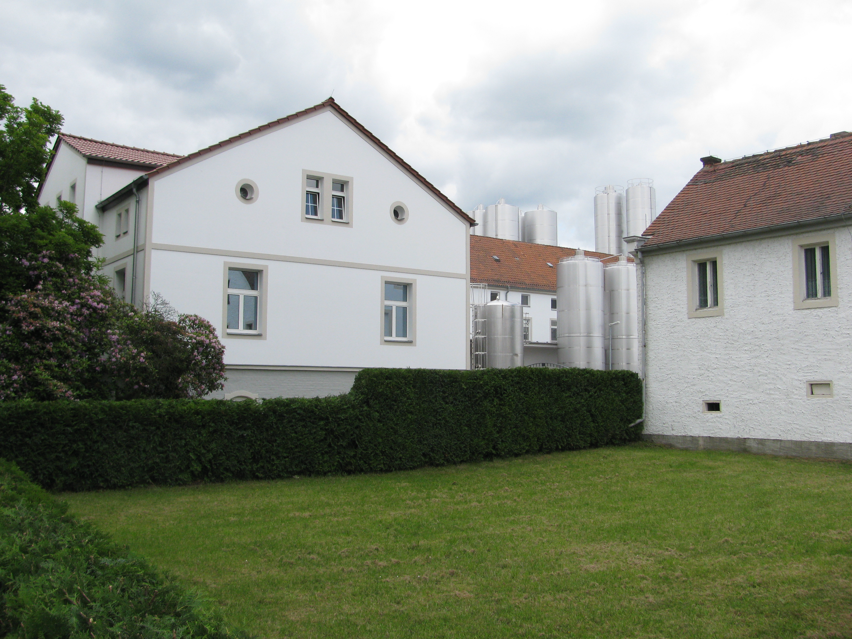 Gebäude der Heinrichsthaler Milchwerke, Radeberg, Sachsen